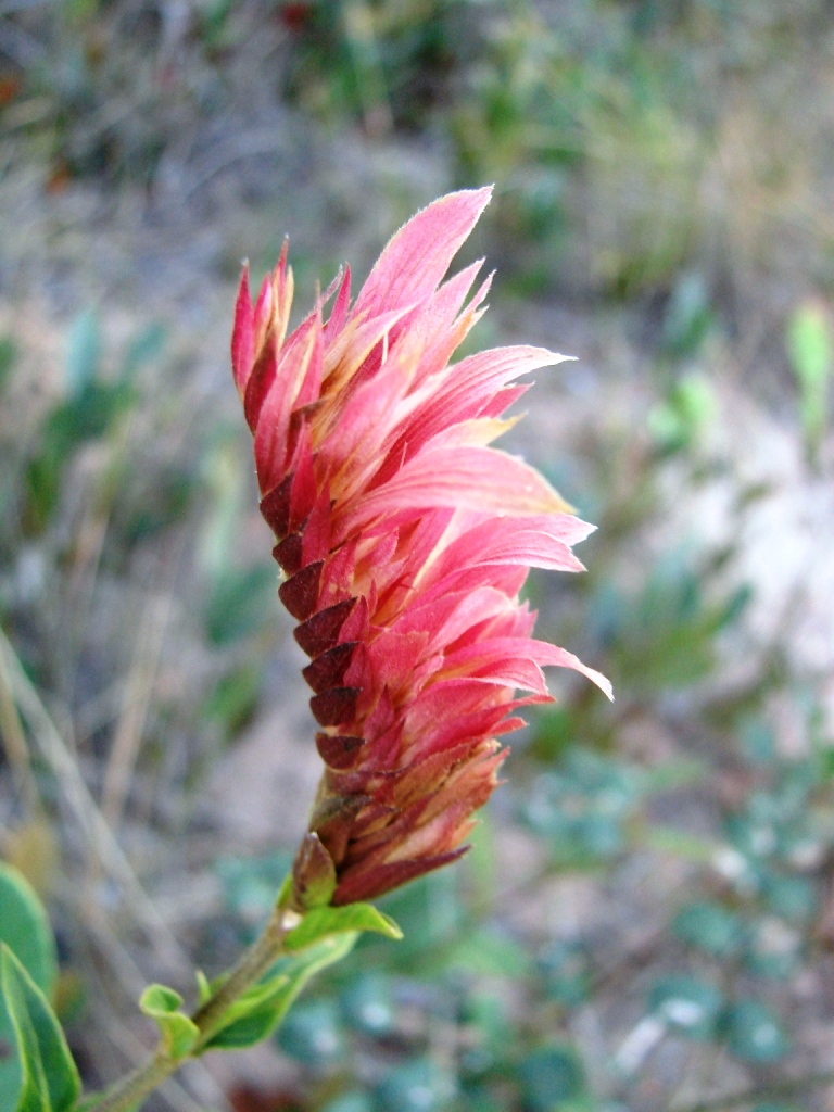 Lepidagathis floribunda (Pohl) Kameyama - ACANTHACEAE - Parque Nacional Grande Sertão Veredas - Chapada Gaúcha - Minas Gerais - Brasil.